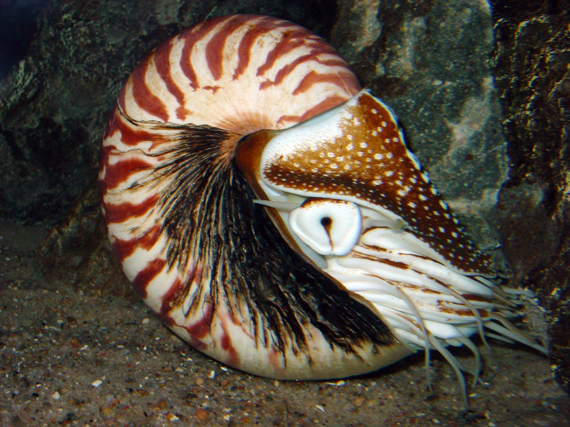 Nautilus in Berlin Zoo Aquarium